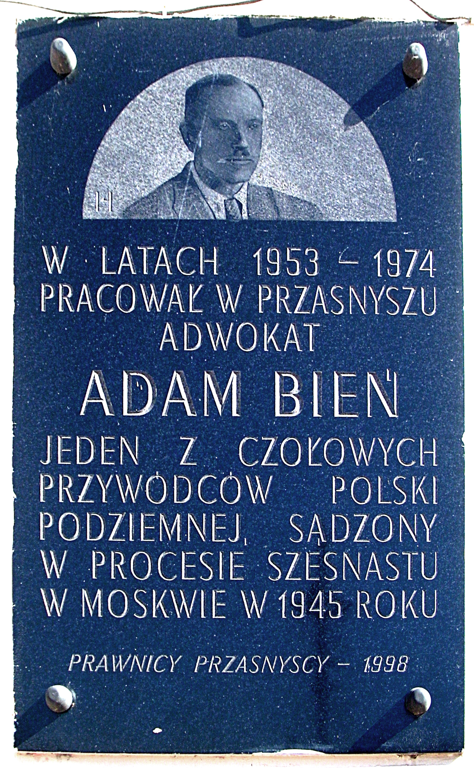 Tablica upamiętniająca praktykę prawniczą Adama Bienia na kamienicy przy rynku w Przasnyszu